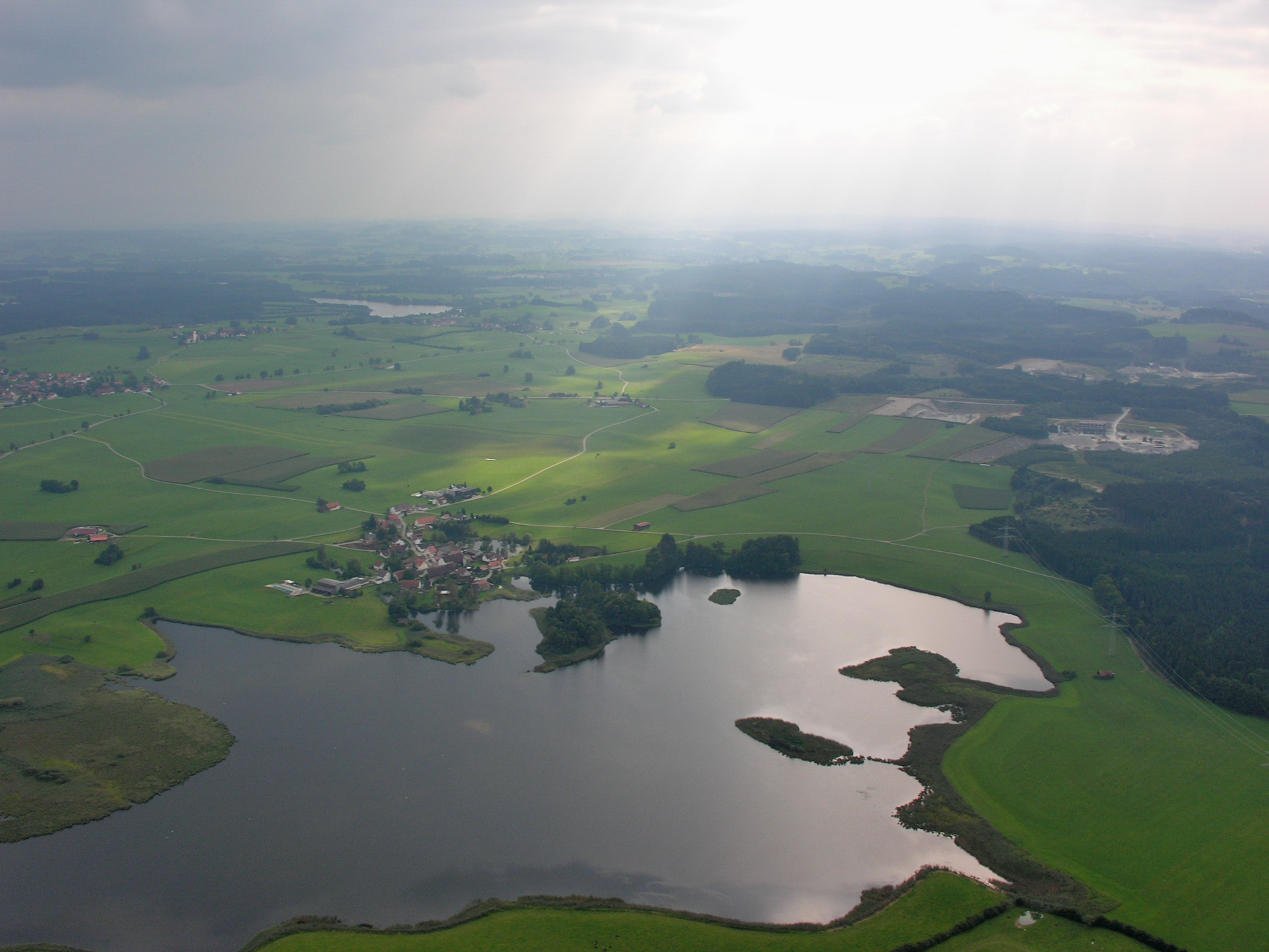 Germany, Baden-Württemberg, aerial view of Rohrsee near Bad Wurzach